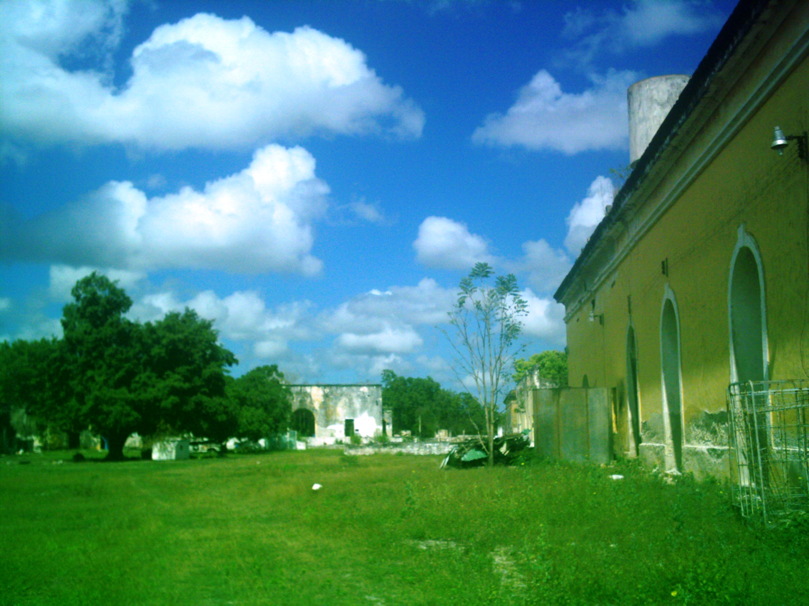 Hacienda de Cheumán, Yucatán.